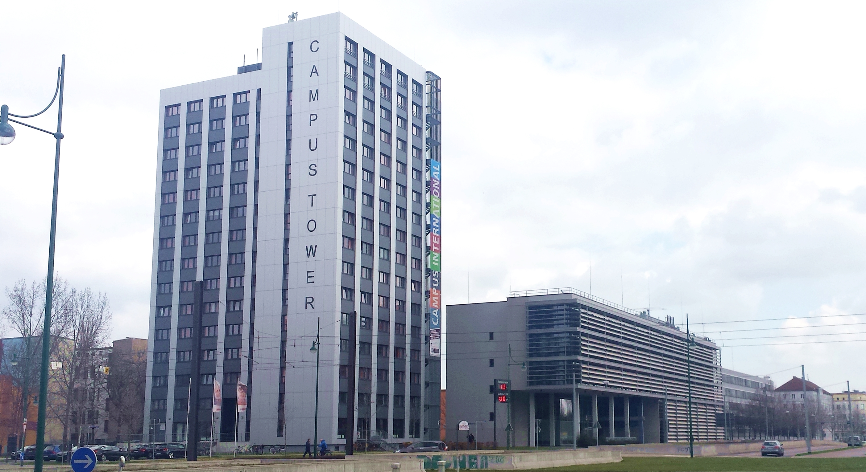 Campustower und Fakultätsgebäude der Otto-von-Guericke-Universität Magdeburg